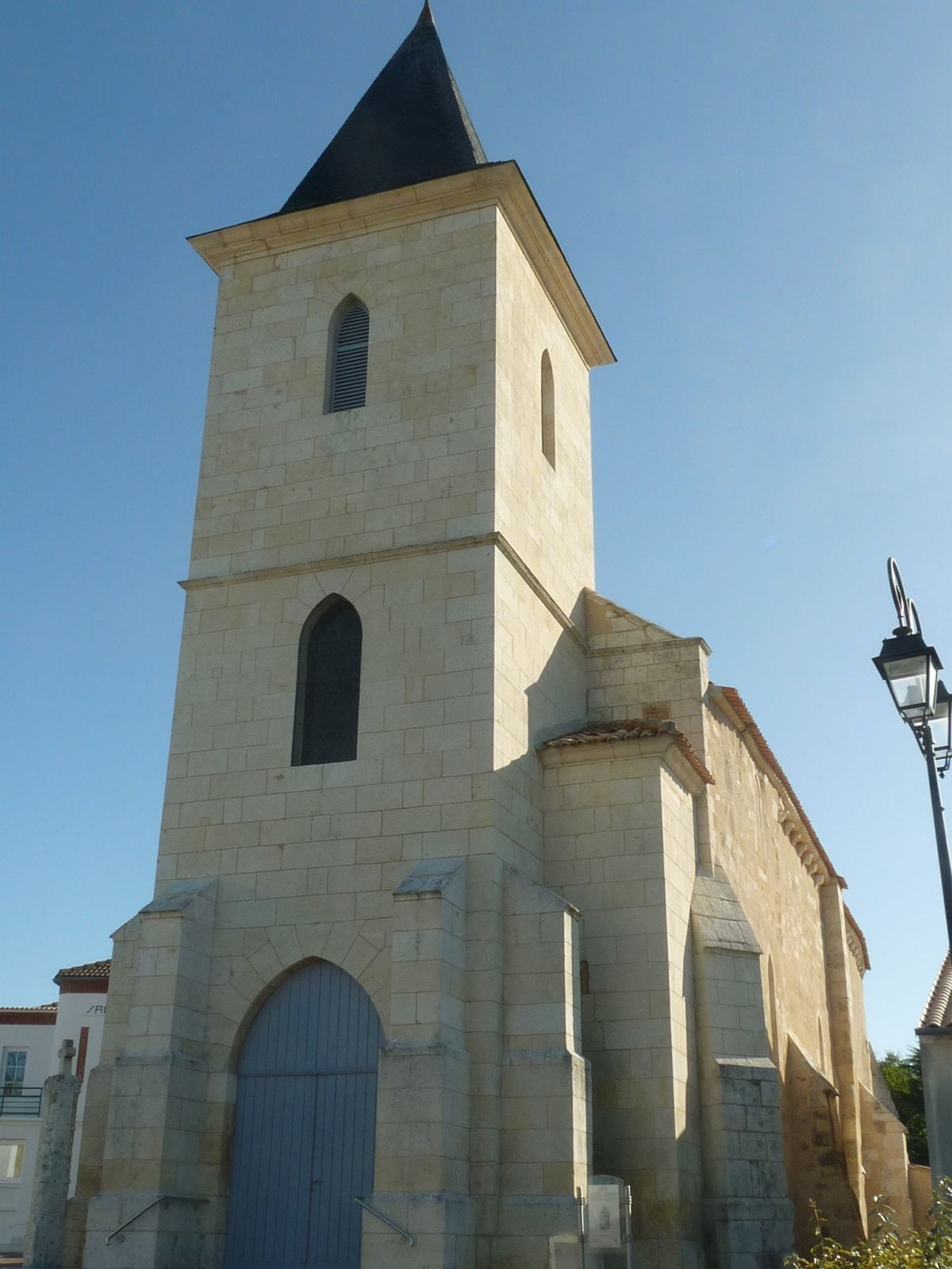 église de Boisredon (17), France